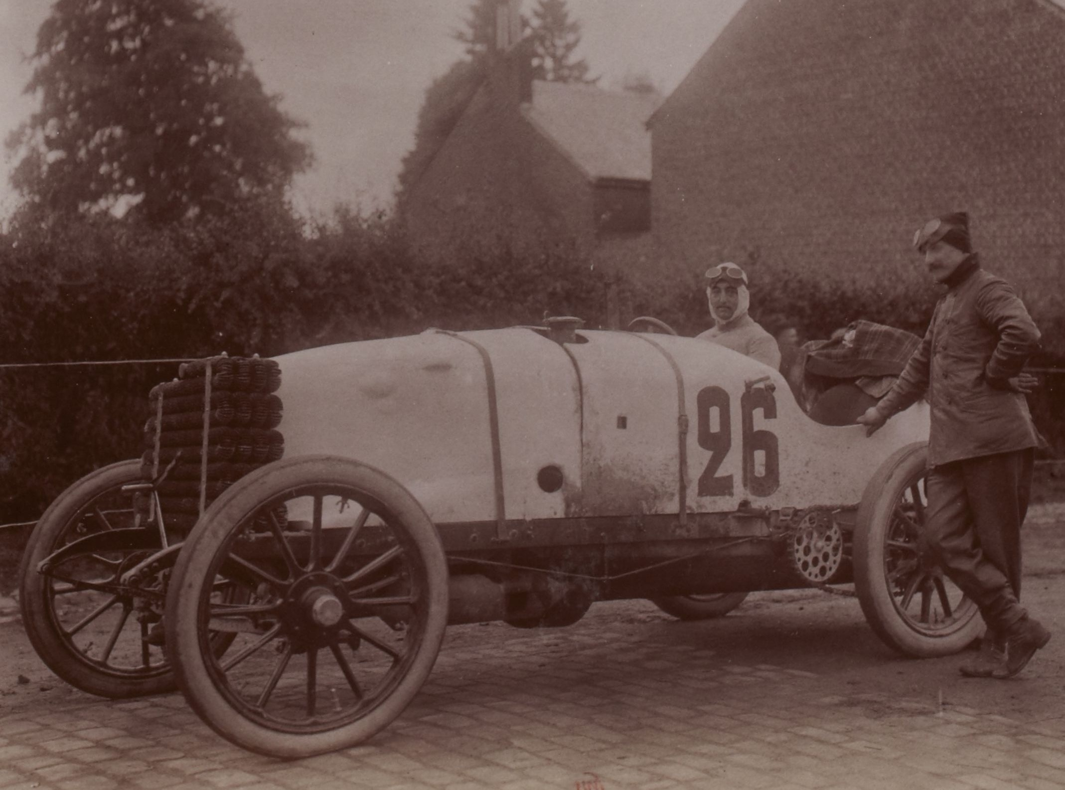 [Collection Jules Beau. Photographie sportive] : T. 27. Année 1904 / Jules Beau : F. 29. [Circuit des Ardennes, Bastogne, 25 juillet 1904]